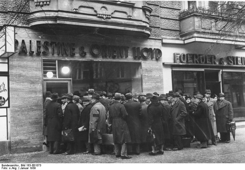 Andrang vor dem Reisebüro des "Palestine & Orient Lloyd" in der Meinekestraße in Charlottenburg. Januar 1939